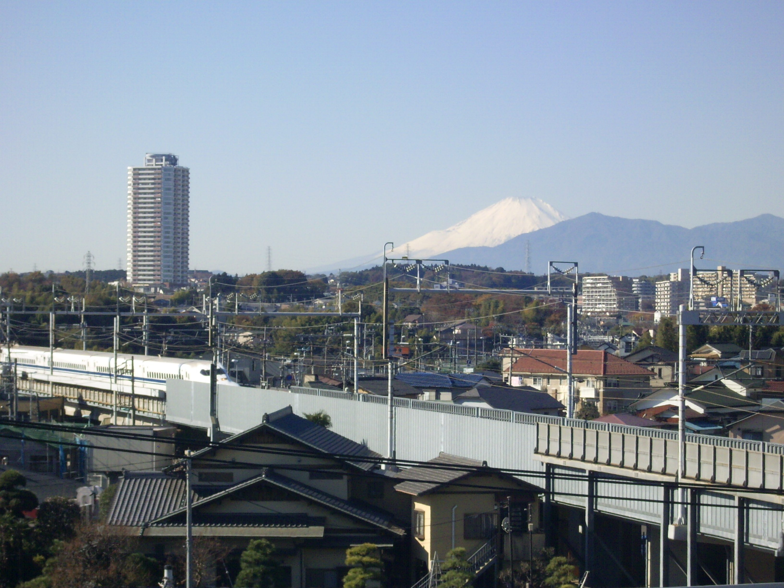 横浜市保土ヶ谷区西谷町の富士山神社より東海道新幹線と冠雪した富士山を望む ㊟カメラを起動すると日付機能が出荷時のものに初期化されるため、ファイル履歴の撮影・投稿日時とメタデータの原画像データの生成日時が異なります